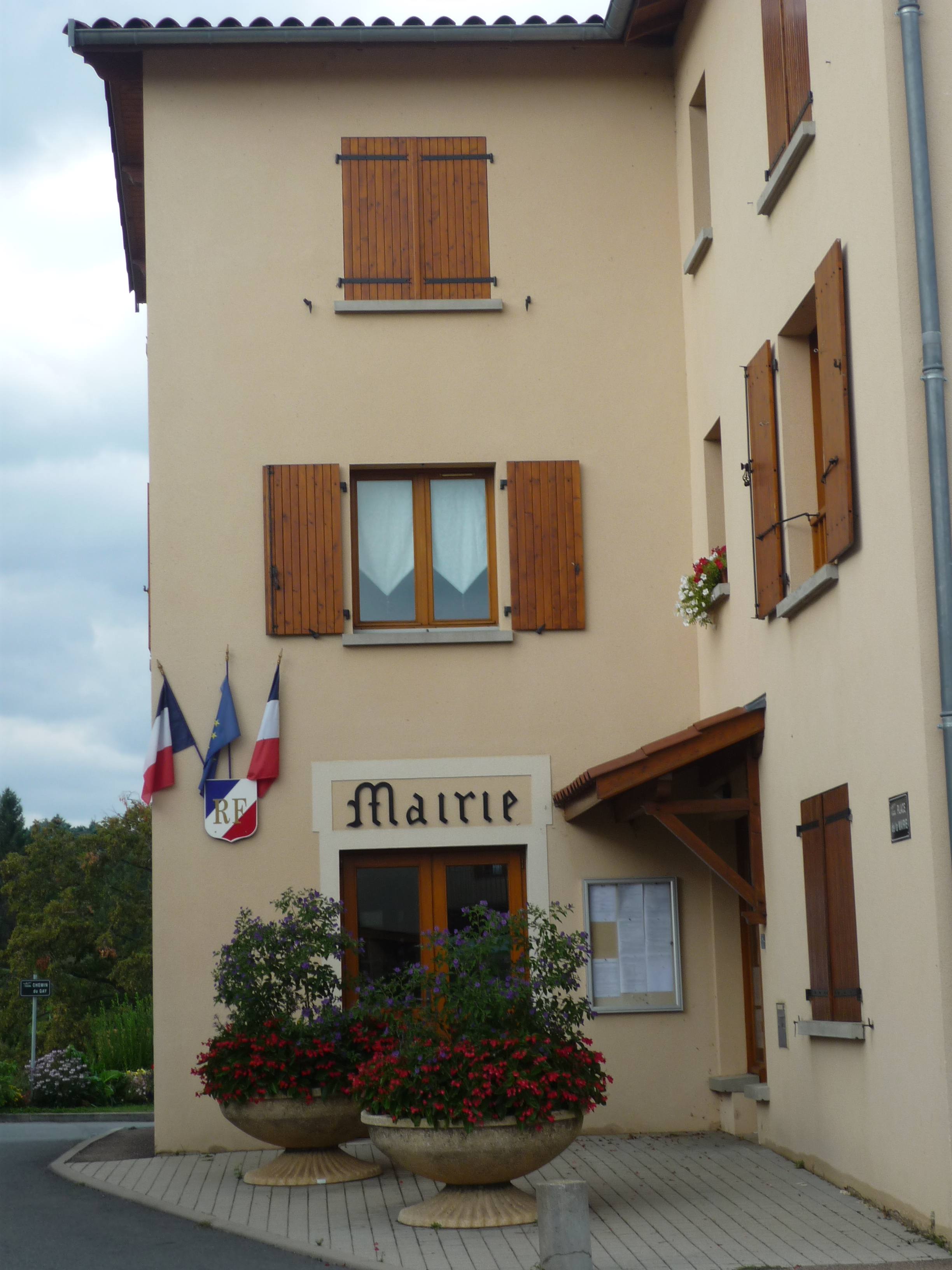 Mairie de la commune de Dareizé dans le département du Rhône